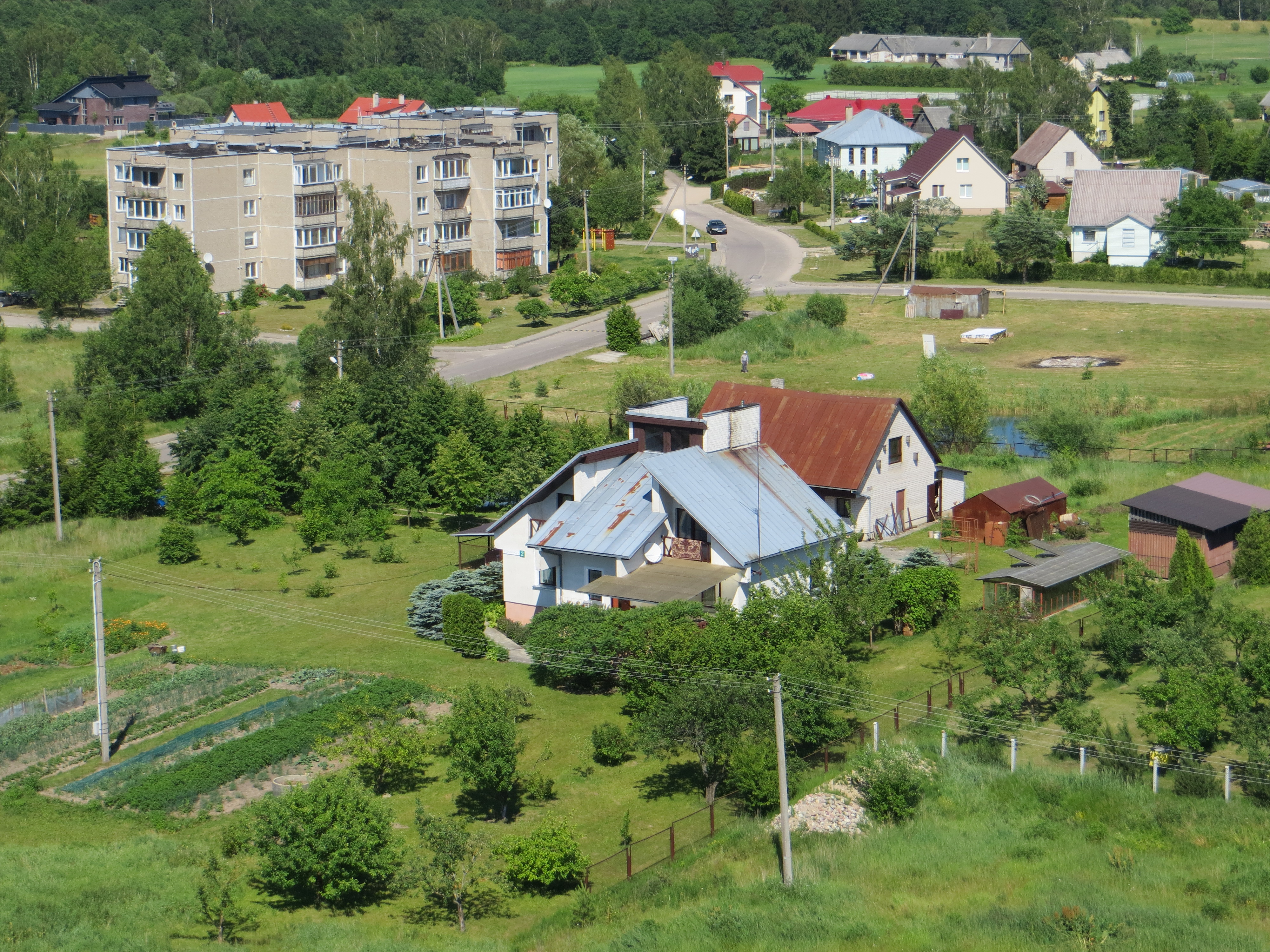 Užupės, Lithuania